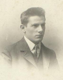 Ben Sajet